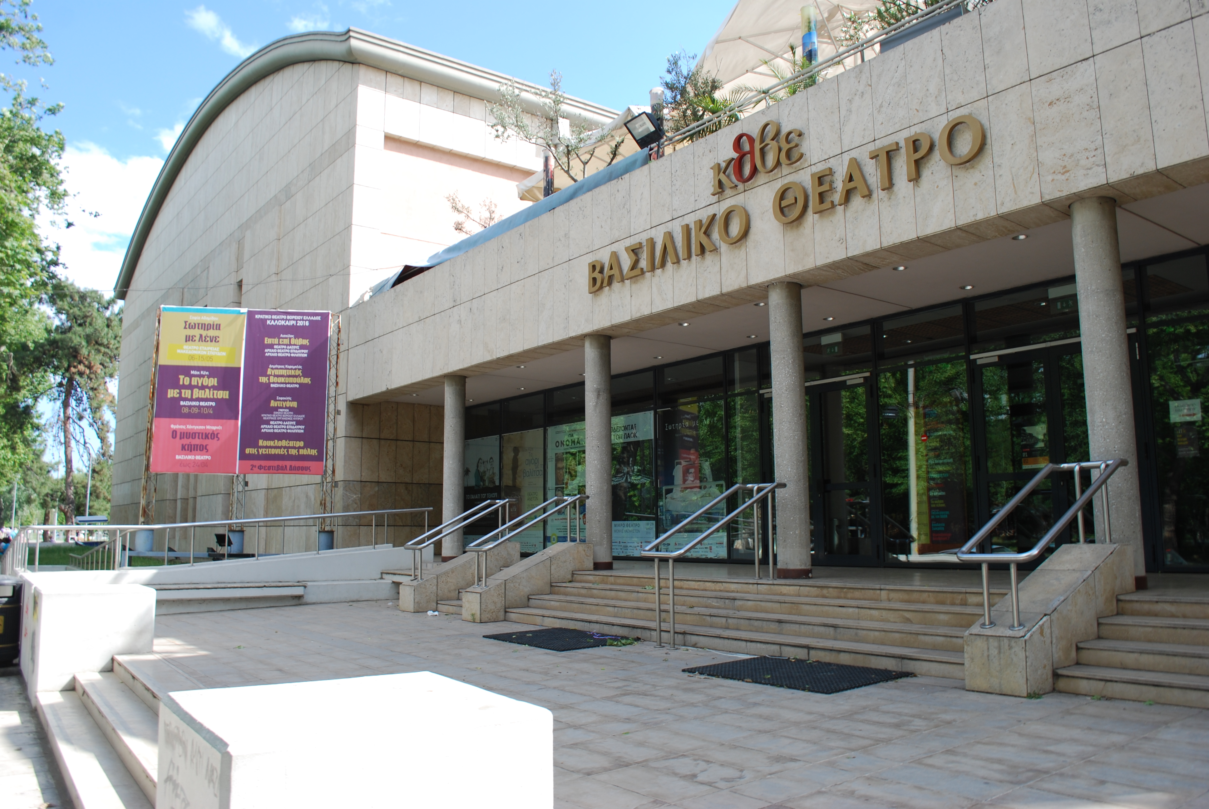 Vue de Thessaloniki.